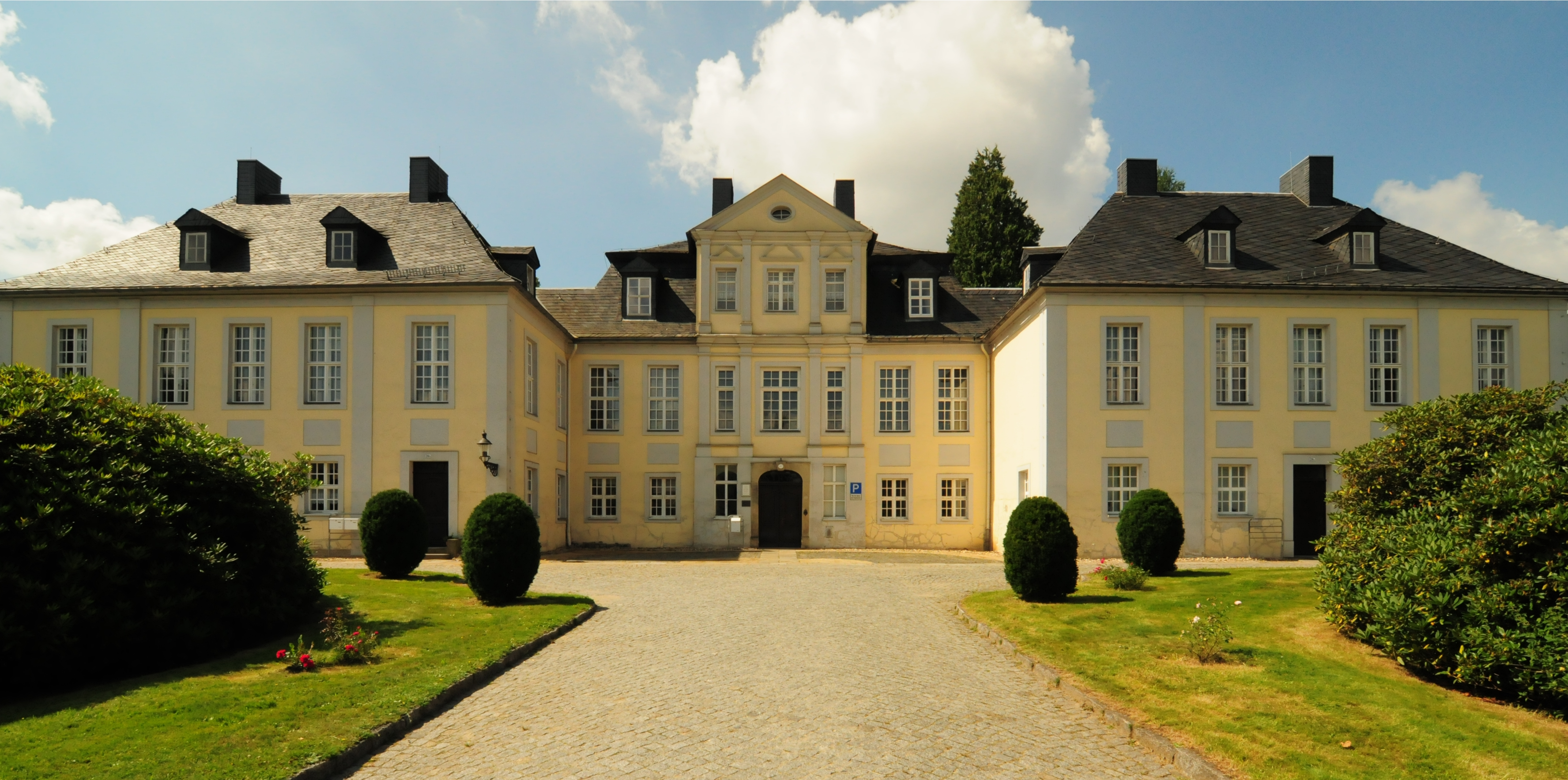 Herrnhut, Vogtshof (Brüder-Unität), Zittauer Str. 20 (Landkreis Görlitz, Sachsen, Deutschland)